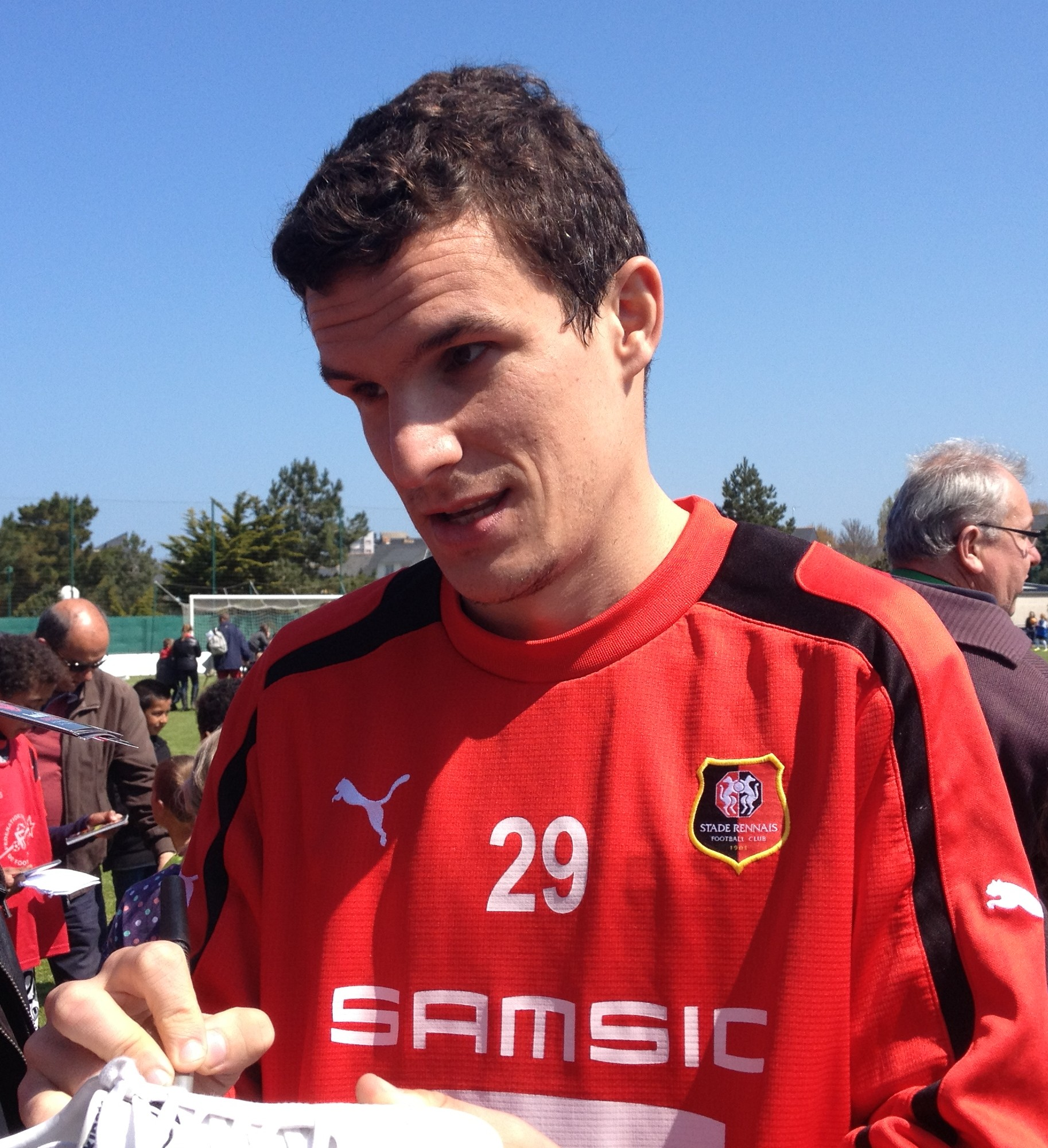 Photo prise lors d'un entraînement du Stade rennais au stade de Marville de Saint-Malo le 3 mai 2013. Romain Danzé répond aux sollicitations des supporters.